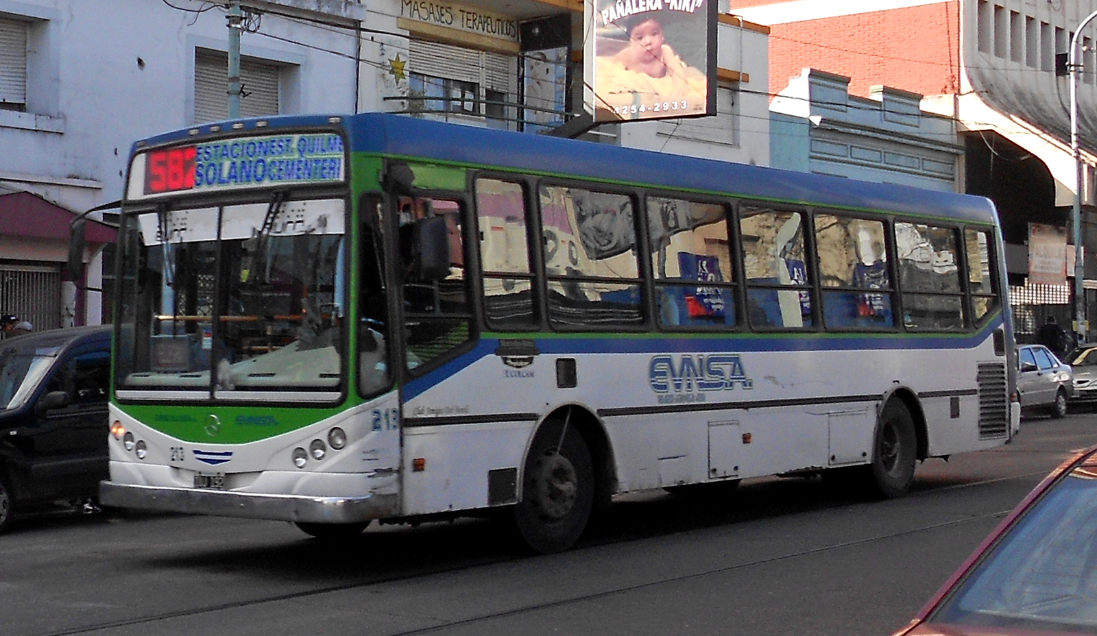 Interno de la línea 582 ramal Pellegrini, circulando por el centro de Quilmes.